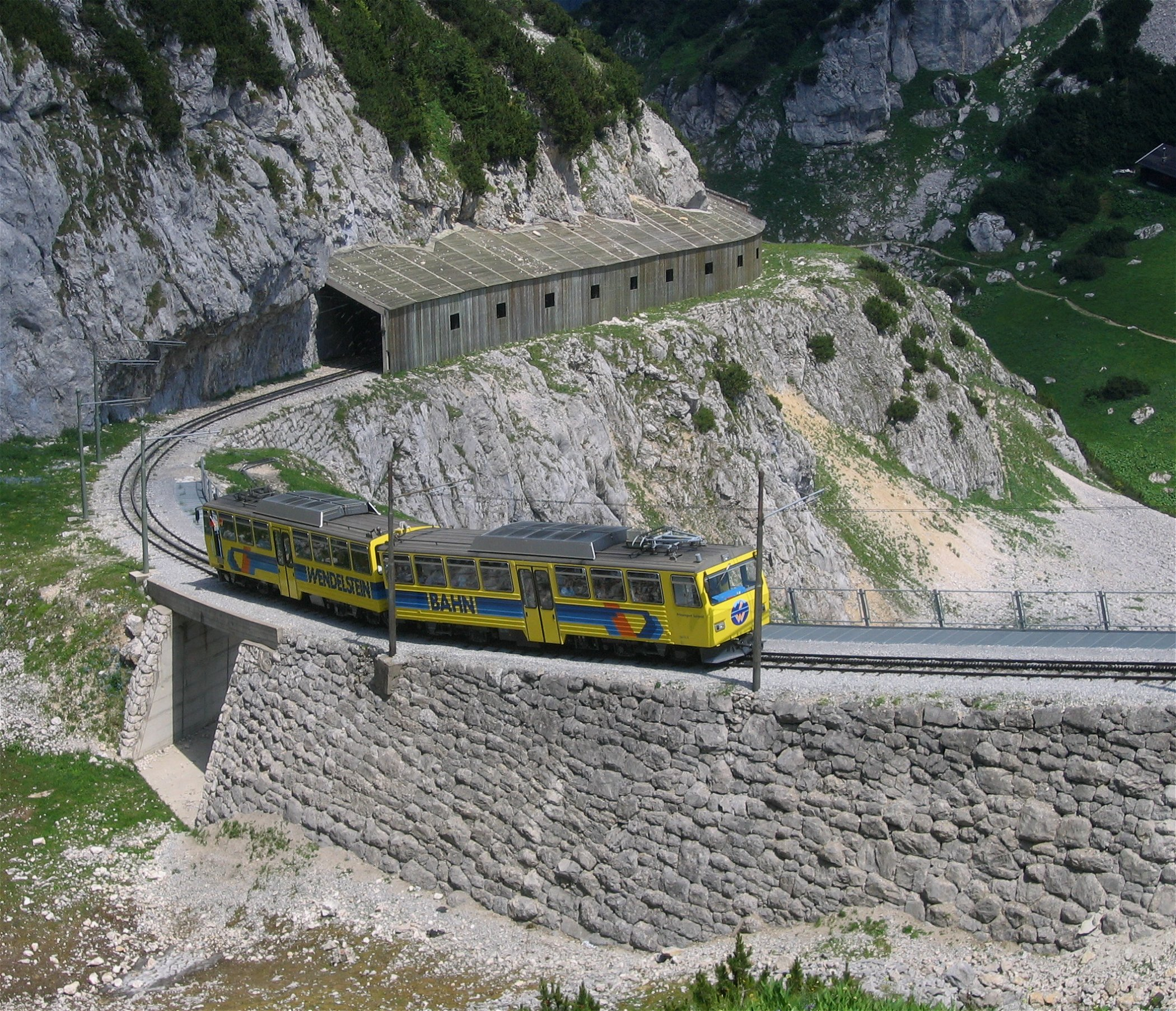 Wendelsteinbahn, Bayern